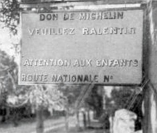 Panneaux indicateurs Michelin, à l'entrée des villages (1911).